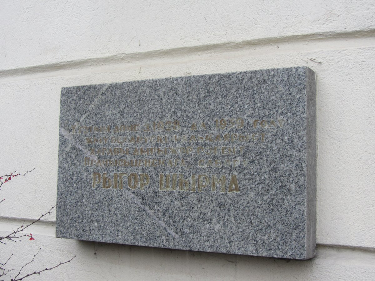 Вільня (Вільнюс). Maironio, 13 на першым паверсе здымаў кватэру і Рыгор Шырма. Дарэчы, будынак пабудаваны па праекце Лявона Вітан-Дубейкаўскага